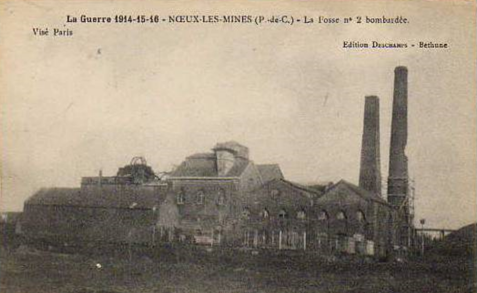 Fosse n° 2 - 2 bis de la Compagnie des mines de Nœux, Hersin-Coupigny, Pas-de-Calais, Nord-Pas-de-Calais, France.